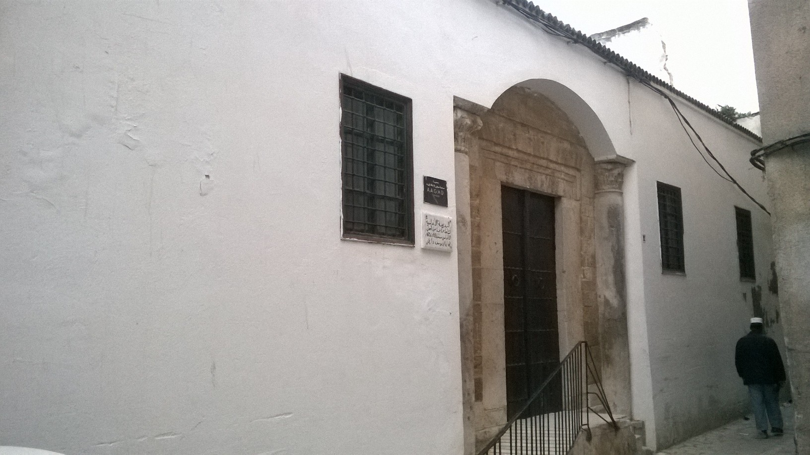 La médina de Tunis مدينة تونس العتيقة